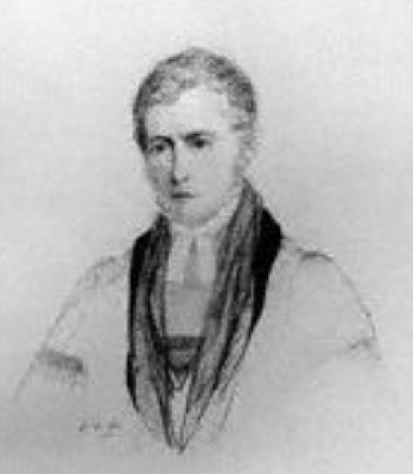 John Anthony Cramer (* 1793; † 1848), britischer Historiker und Altphilologe